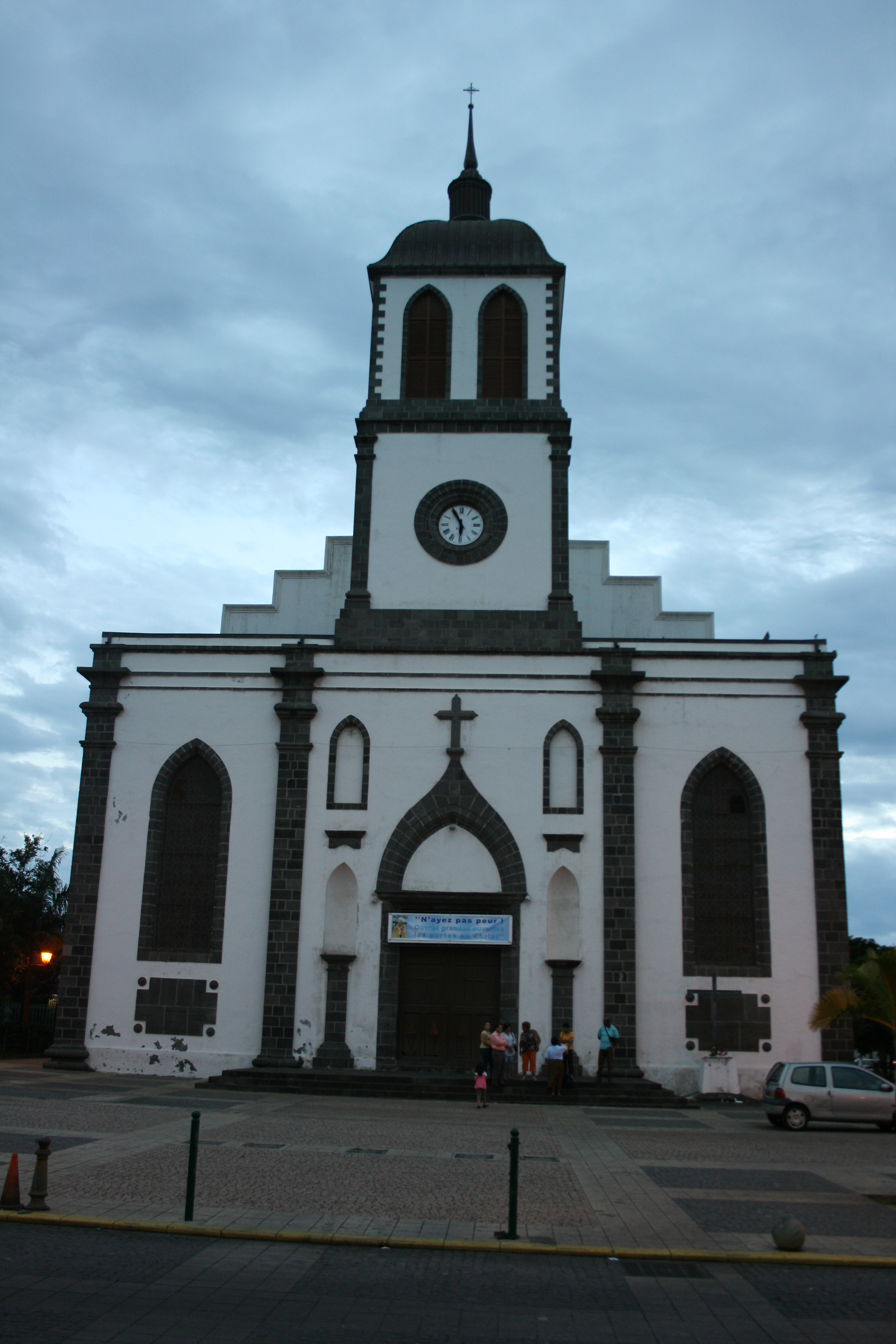 Vue de la façade de l'église Saint-Louis, à Saint-Louis de La Réunion.